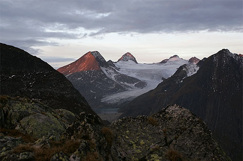 Griesgletscher und Griessee vom Nufenenpass her gesehen